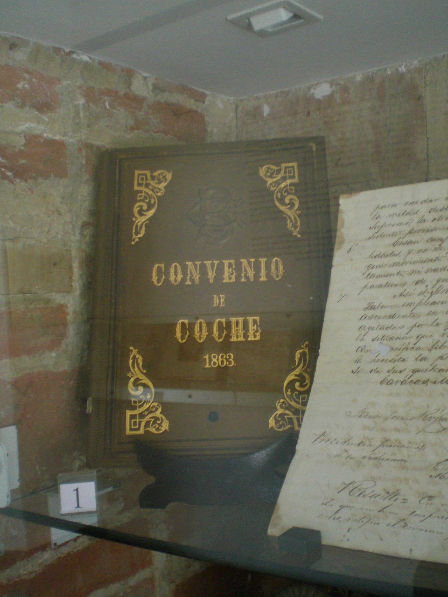 Libro con las actas del Convenio de Coche preservado por la Fundación John Boulton, Caracas, Venezuela.